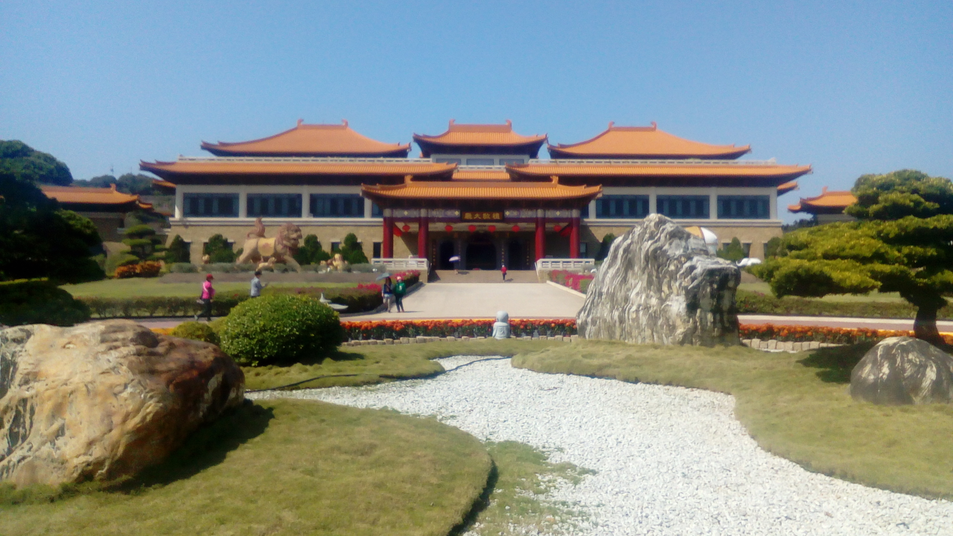 主要作為商品展售區